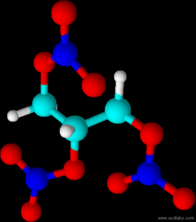 Représentation tridimentionelle de la nitroglycérine